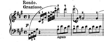 Compassos iniciais do quarto movimento da Sonata Op. 2 n. 2 de Beethoven